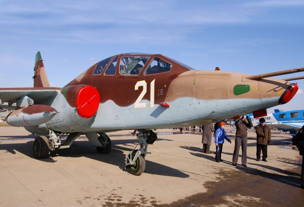 Su-25UBM